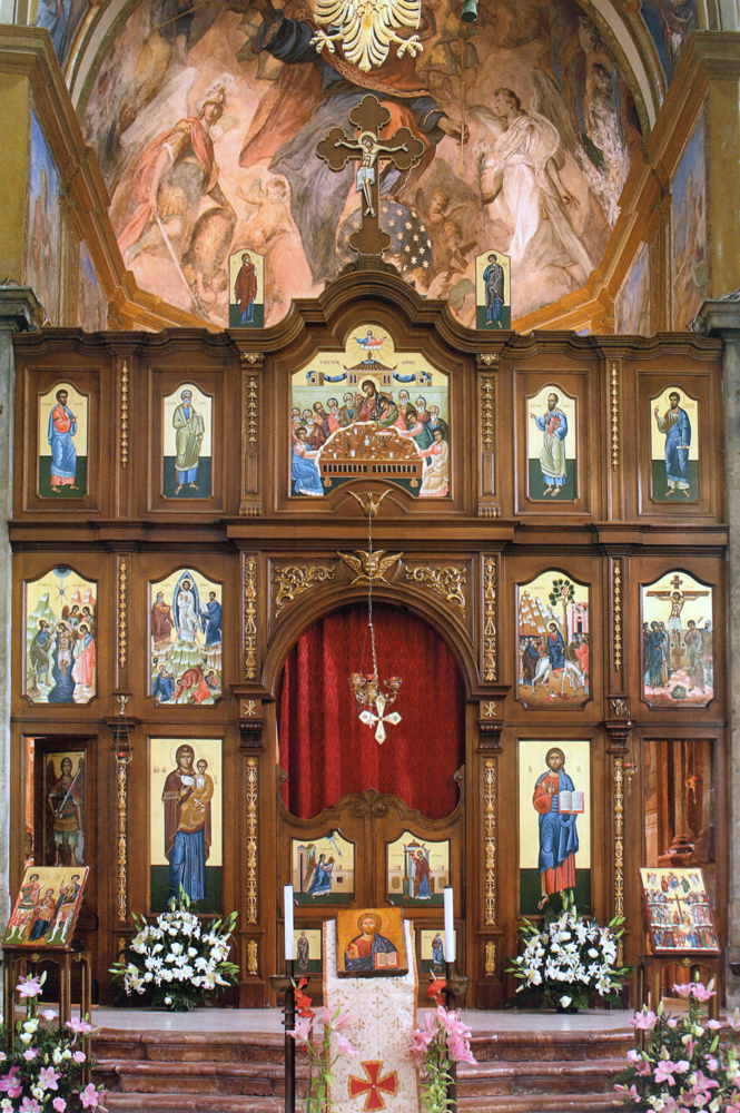 Ikonostasi, Hora e Arbëreshëvet, Klisha e Shën Mitrit të Madhit Dëshmor.